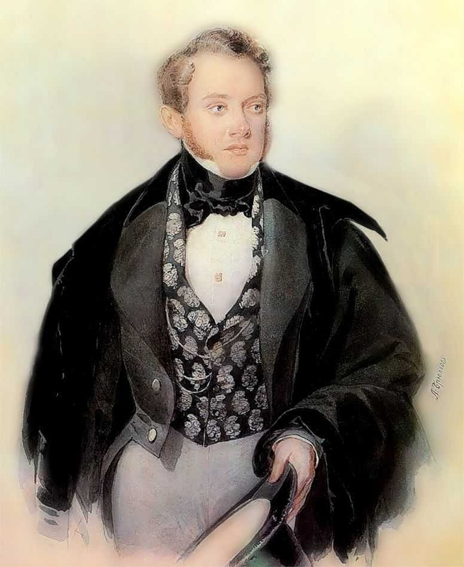 Изначально атрибутировался как портрет С. А. Соболевского, однако на выставке работ Александра Брюллова, прошедшей в Московском литературном музее А.С.Пушкина в 2013 году портрет был научно атрибутирован как портрет Александра Михайловича Борха (Александр-Антон-Станислав-Бернгард; 1804—1867) (сообщил посетитель этой выставки московский краевед А.И.Кадетов)